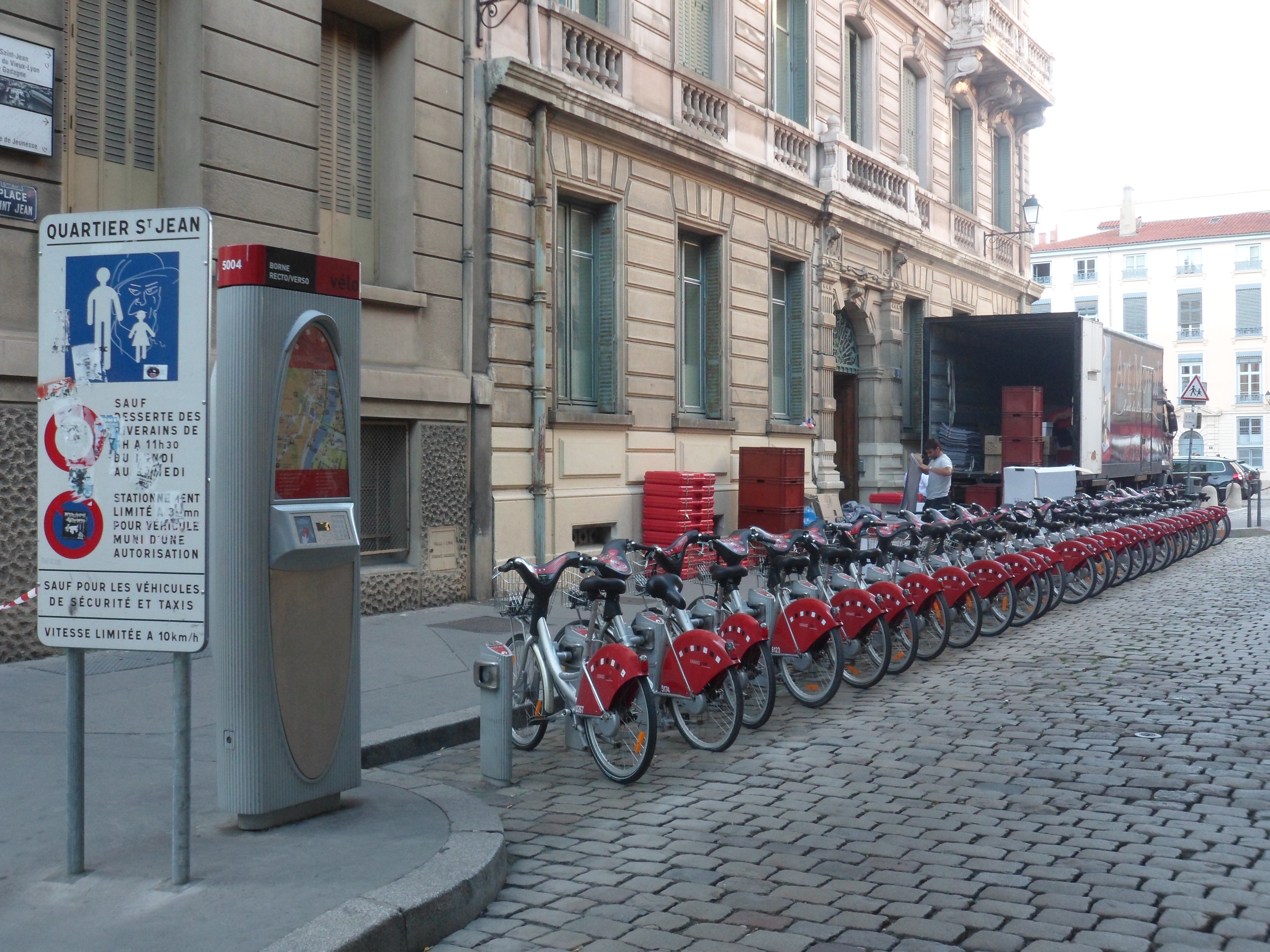 Station Vélo'v Vieux Lyon Cathédrale Saint Jean